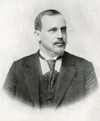 Josef Steiner (1862 - 1912), Rakouský a český novinář a politik.